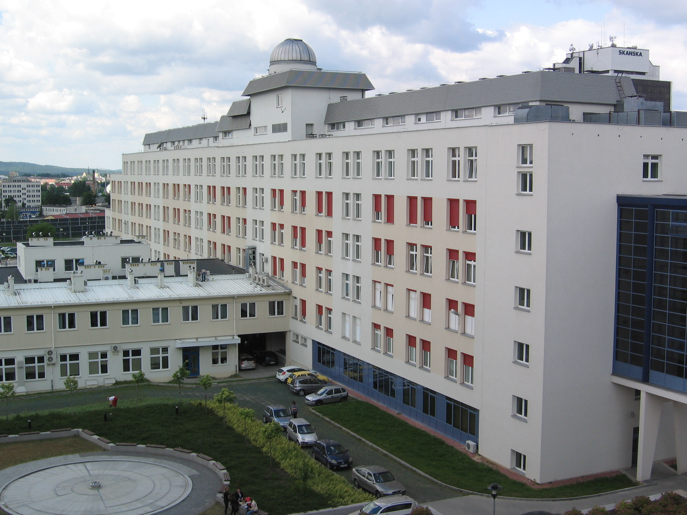 Budynek Wydziału Matematyczno-Przyrodniczego UJK w Kielcach z otwartym w 2003 roku Obserwatorium Astronomicznym i Planetarium